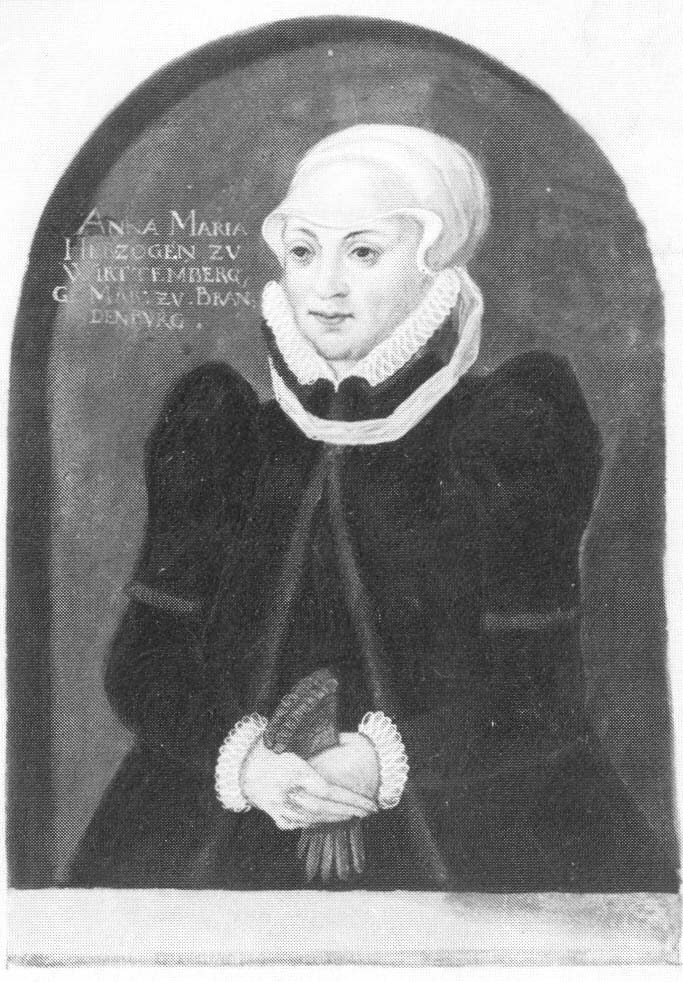 Markgräfin Anna Maria zu Brandenburg, Gattin Herzog Christophs von Württembg Pergamenthandschrift, Grisaille, Deckfarben eingescannt aus: Die Renaissance im deutschen Südwesten zwischen Reformation und Dreißigjährigem Krieg. Eine Ausstellung des Landes Baden-Württemberg, Heidelberger Schloss, 21. Juni - 19 Oktober 1986